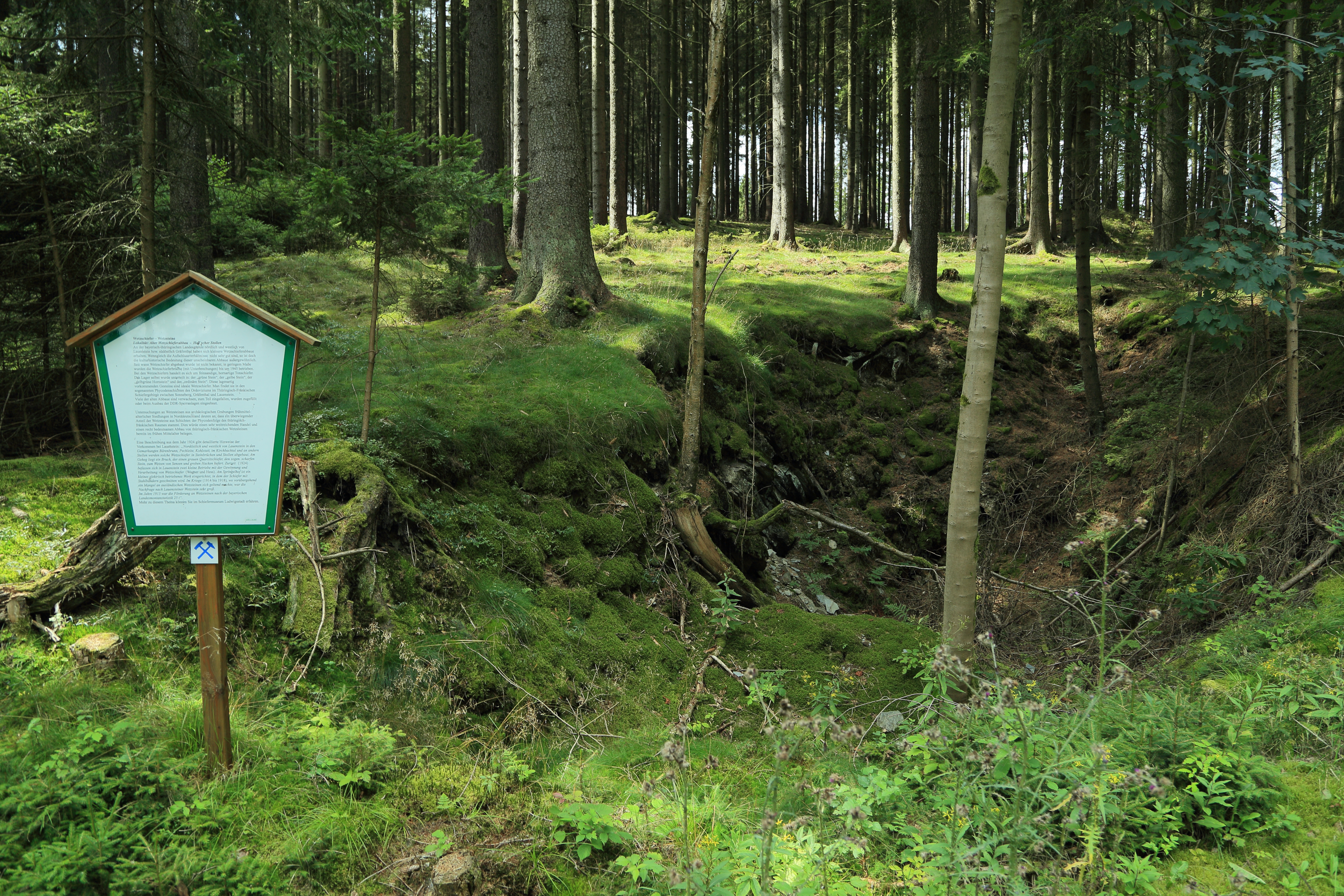 Aufgelassener Wetzschieferbruch Bärenbrunn N von Lauenstein Geotop-Nummer: 476G005